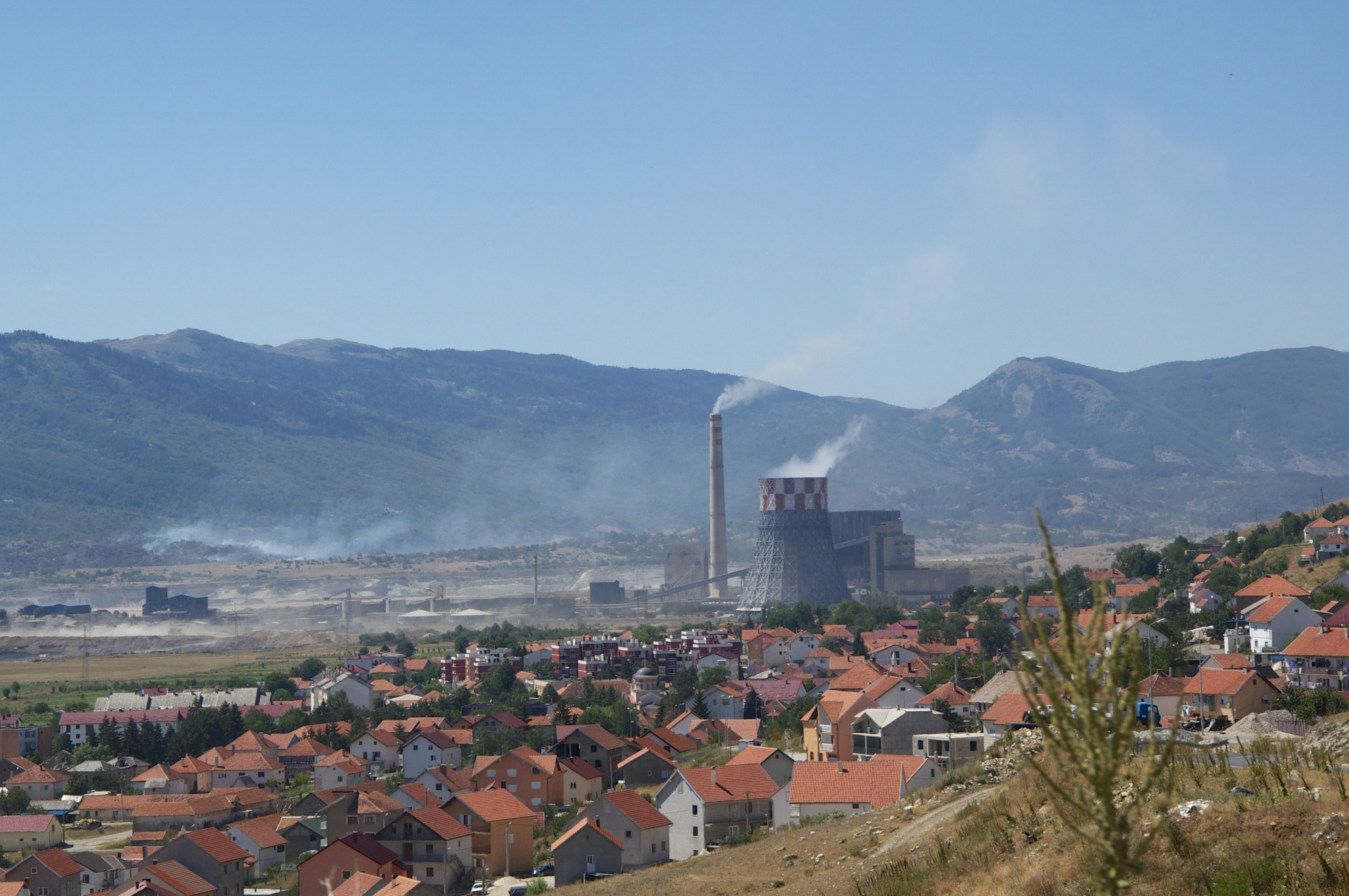 Gacko (Repubblica Srpska)